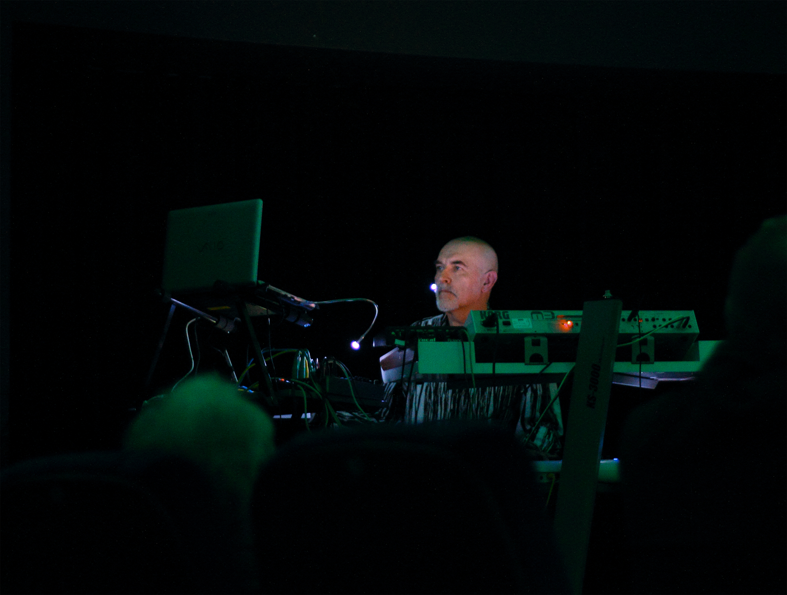 Verleihung des Schallwelle-Musikpreises am 10. März 2012. Kuppel des Planetariums Bochum. Konzert von Michel Huygen alias Neuronium.